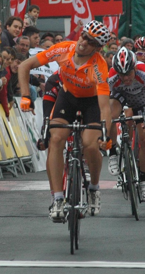 Koldo FERNANDEZ DE LARREA (EUSKALTEL-EUSKADI) entrando vencedor en la Meta de Agurain. Euskal Bizikleta 2008